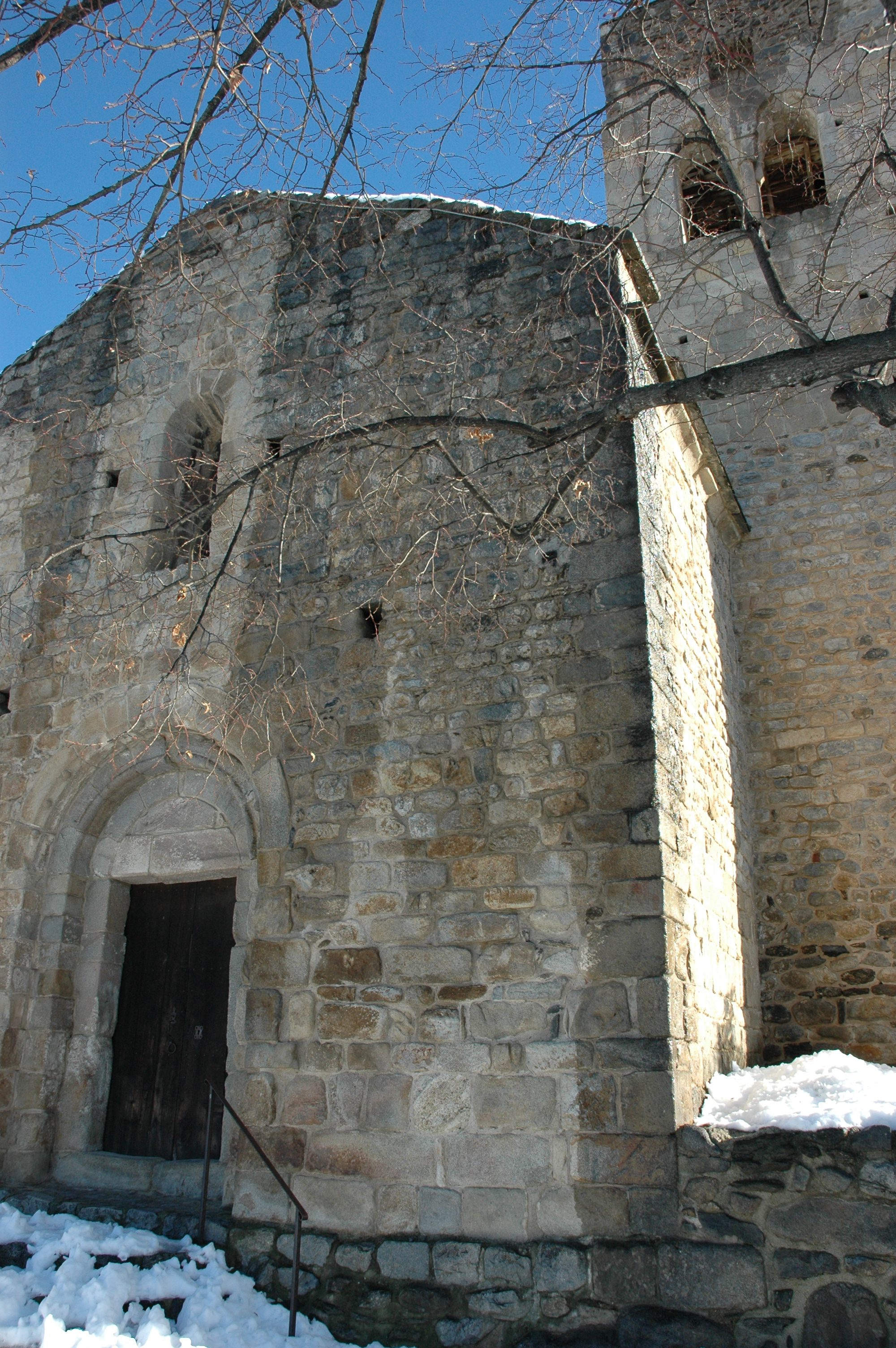 Sant Feliu de Fillols - Porta